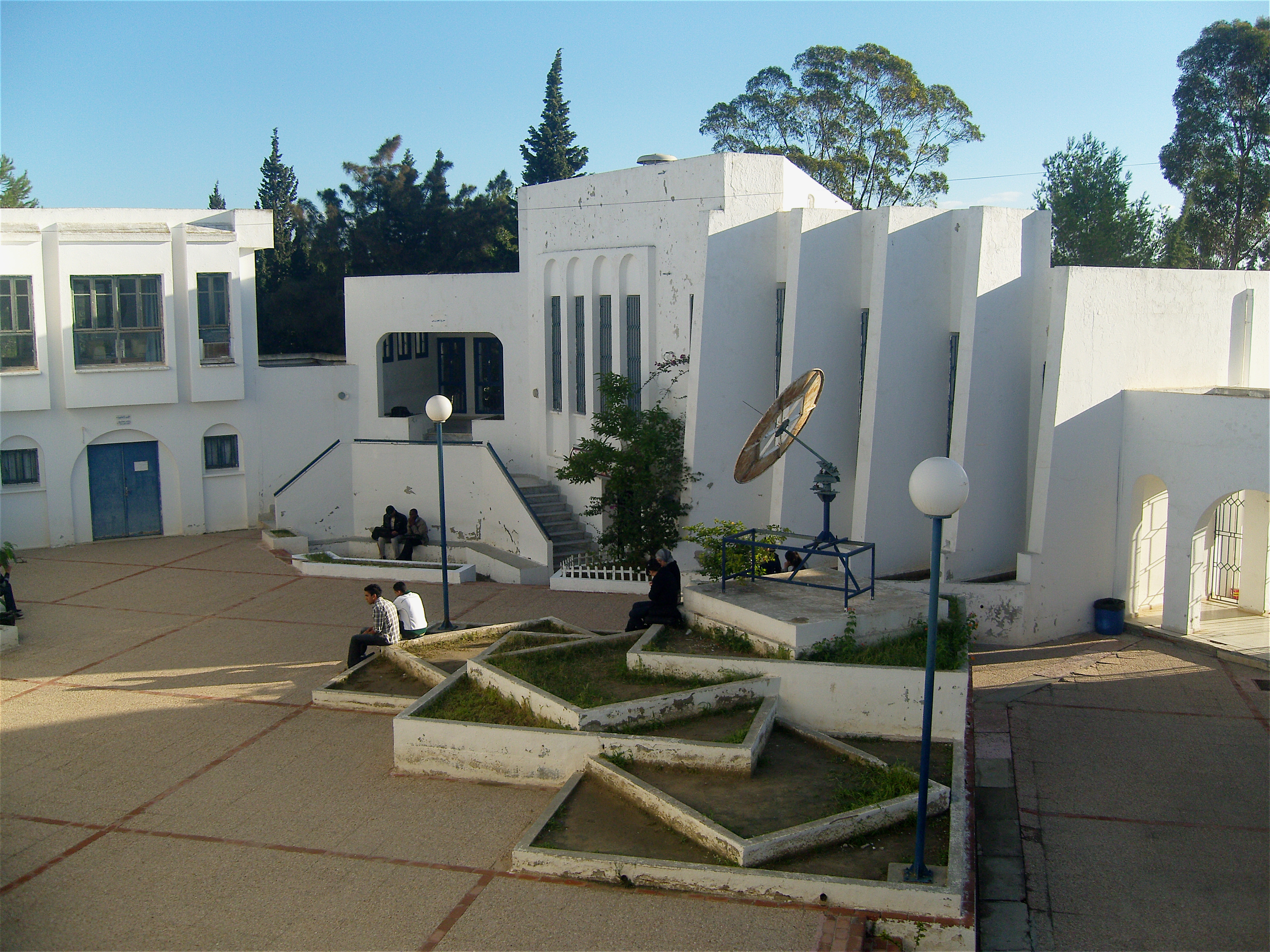 Cour intérieure du bâtiment B de l'Institut supérieur des études technologiques de Nabeul (Tunisie)